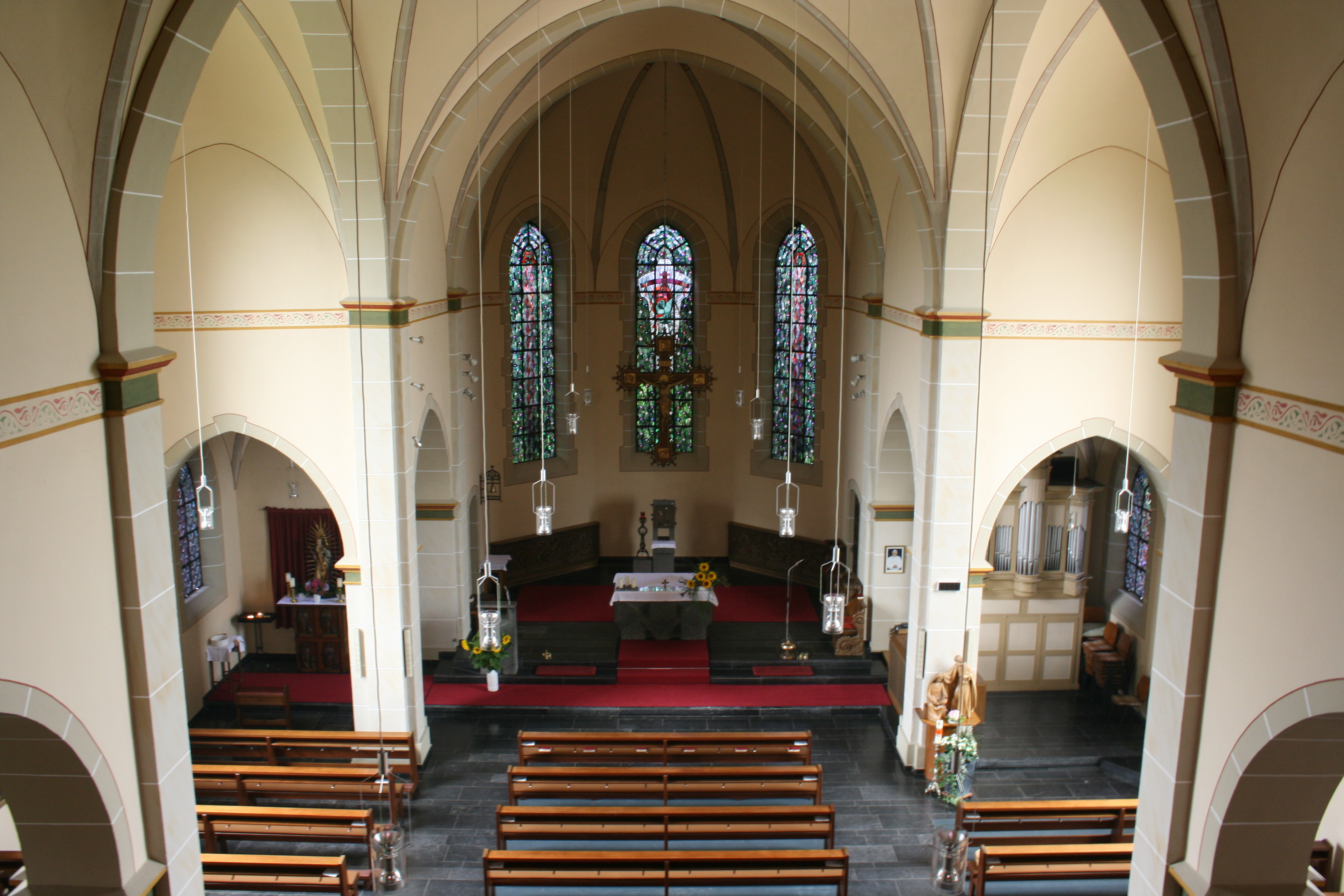 Zur Heiligen Familie in Uedem-Uedemerbruch